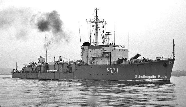 die Schulfregatte Raule der Bundesmarine im letzten Bewaffnungszustand